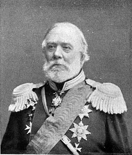 генерал Сиверс, Евгений Егорович